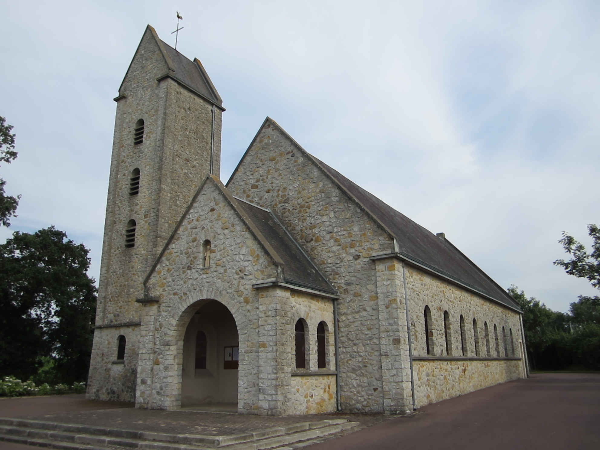 église Saint-Pierre de Nay (Manche)